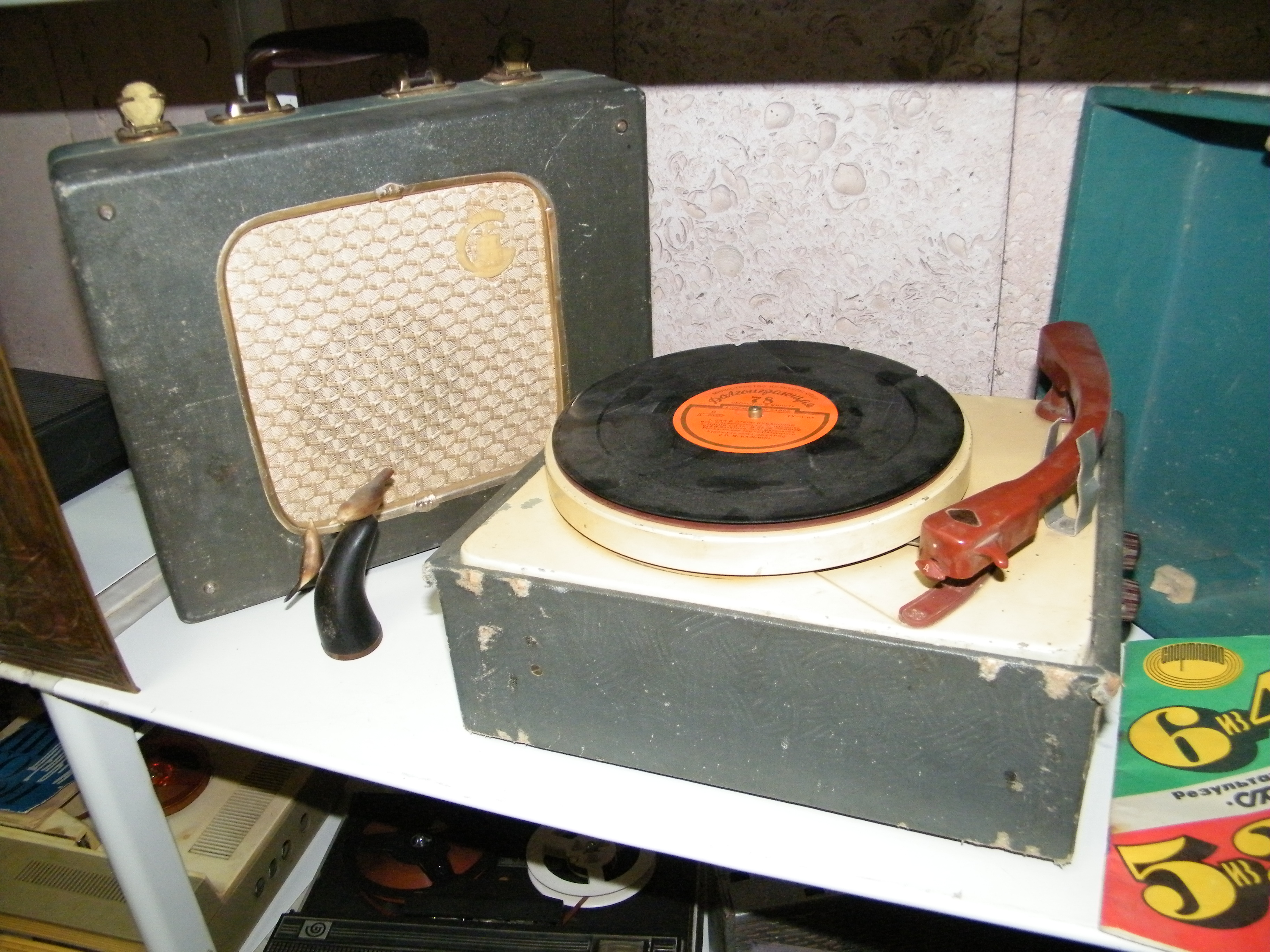 Теплый ламповый звук